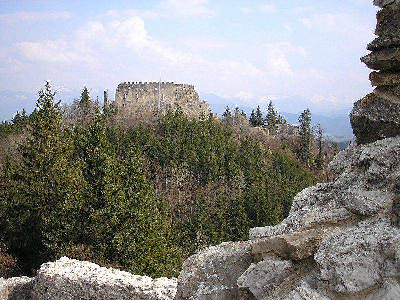 Burg Eisenberg bei Pfronten (Allgäu). Ansicht von der Nachbarburg Hohenfreyberg.